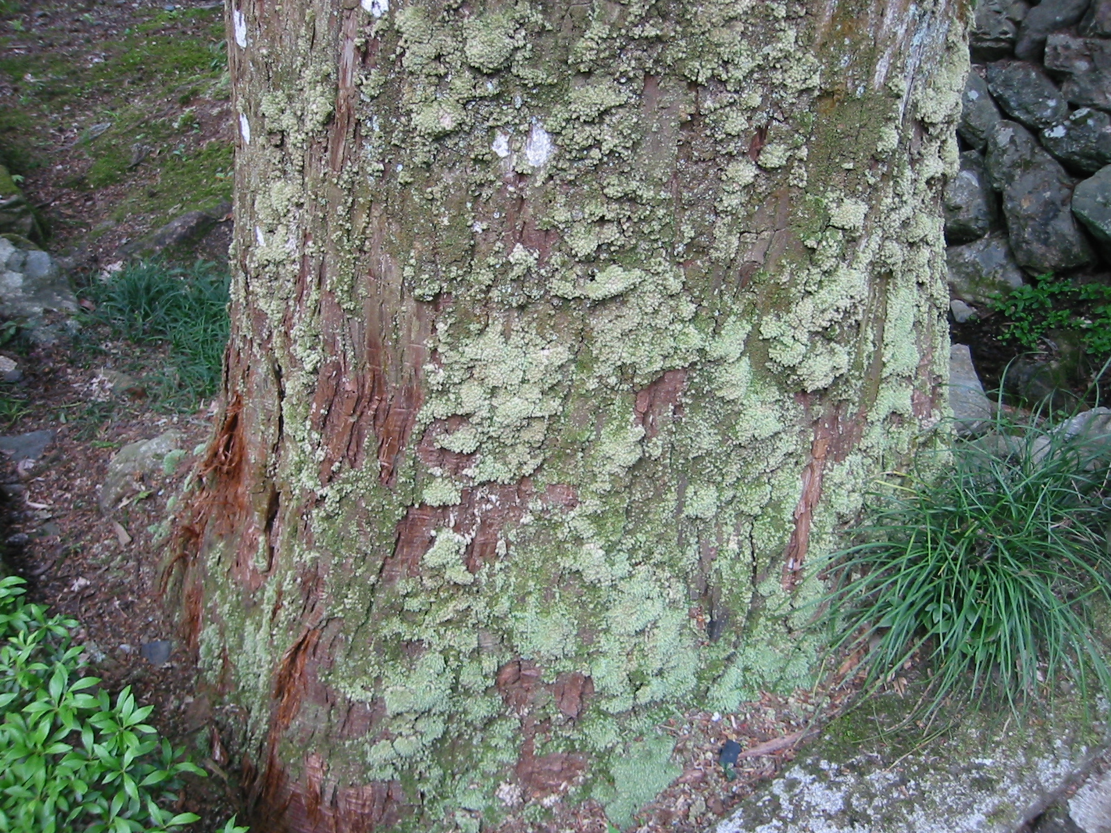 谷汲山華厳寺